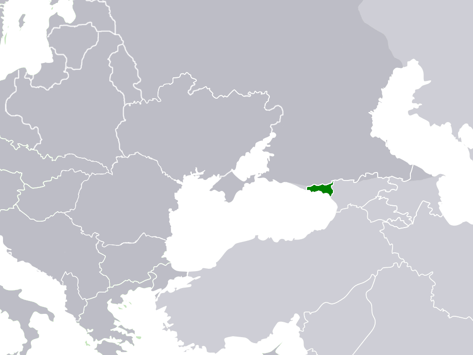 карта расположения ССР Абхазии (1921)